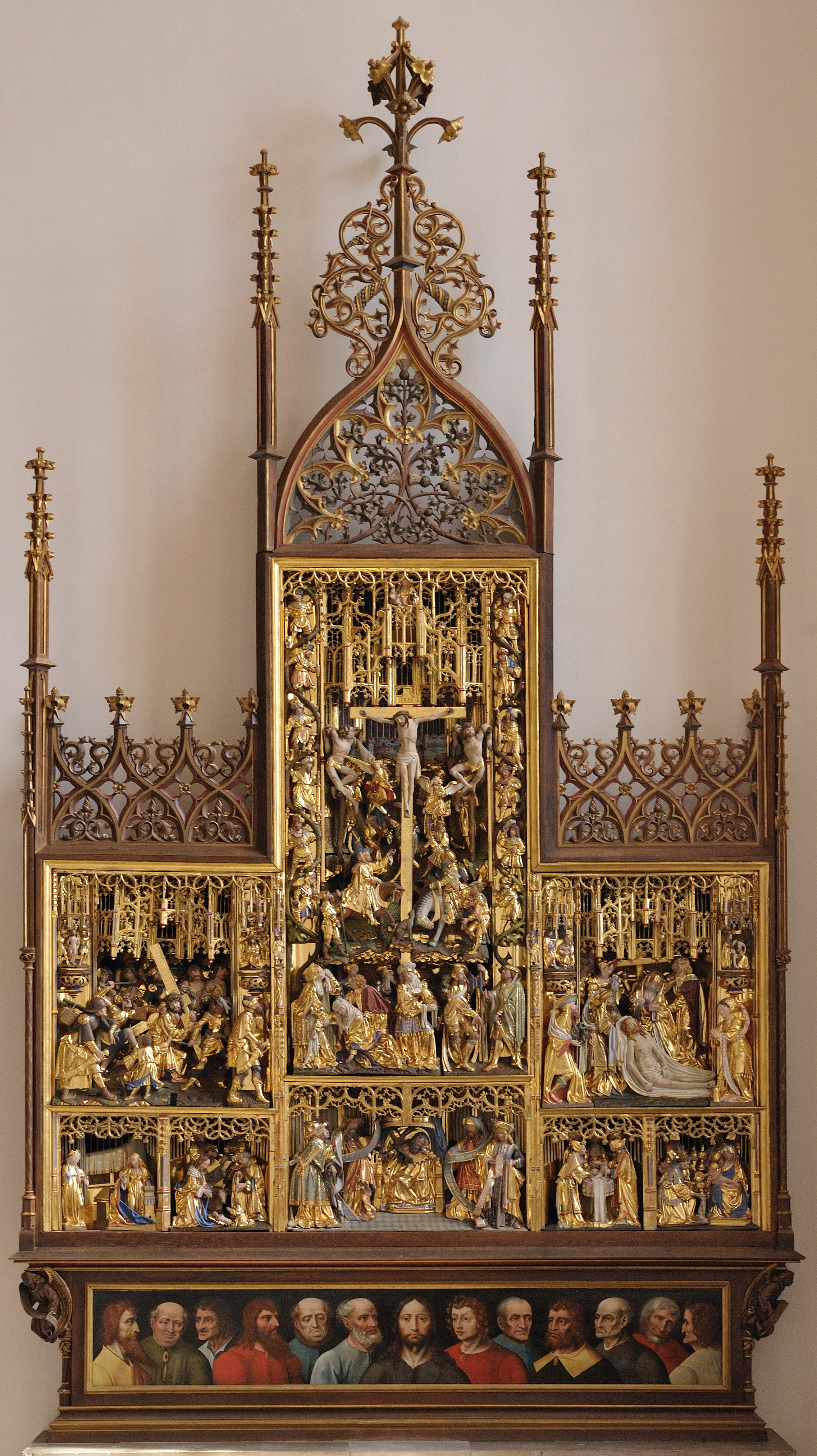 Antwerpener Schnitzretabel (Passionsaltar) in St. Pankratius, Bergheim-Paffendorf, um 1515-1520. Das Foto zeigt den Altar nach der Restaurierung im Jahre 2012.